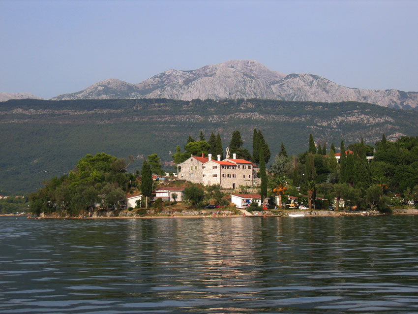 Михољска Превлака, (Никострат Саронски).